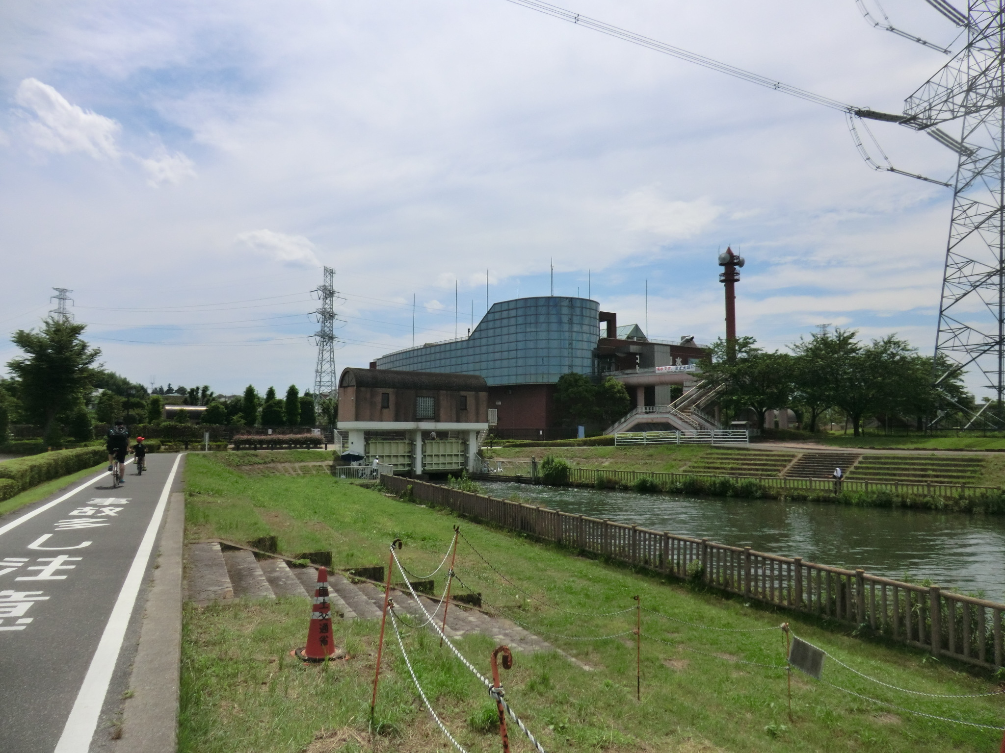 北千葉導水路ビジターセンターと北千葉第二機場。画面右手前が手賀沼。左の道の脇の地下を埋設管として北千葉導水路が通っている。